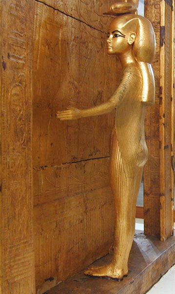 Une des 4 déesses protectrices de la chapelle des canopes (Isis, Nephthys, Neith, Selkit) (bois doré) La tombe de Toutankhamon (1340-1331 AV. J.C.) a été découverte par Howard Carter en novembre 1922. Le pharaon est mort à 19 ans, sa momie se trouvait dans un cercueil en or massif, placé à l'intérieur de 2 cercueils en bois. Ces 3 cercueils étaient dans un sarcophage de quartzite à couvercle de granit rouge. Autour du sarcophage, s'emboîtaient les unes dans les autres, 4 chapelles en bois doré qui occupaient entièrement la salle du sarcophage.